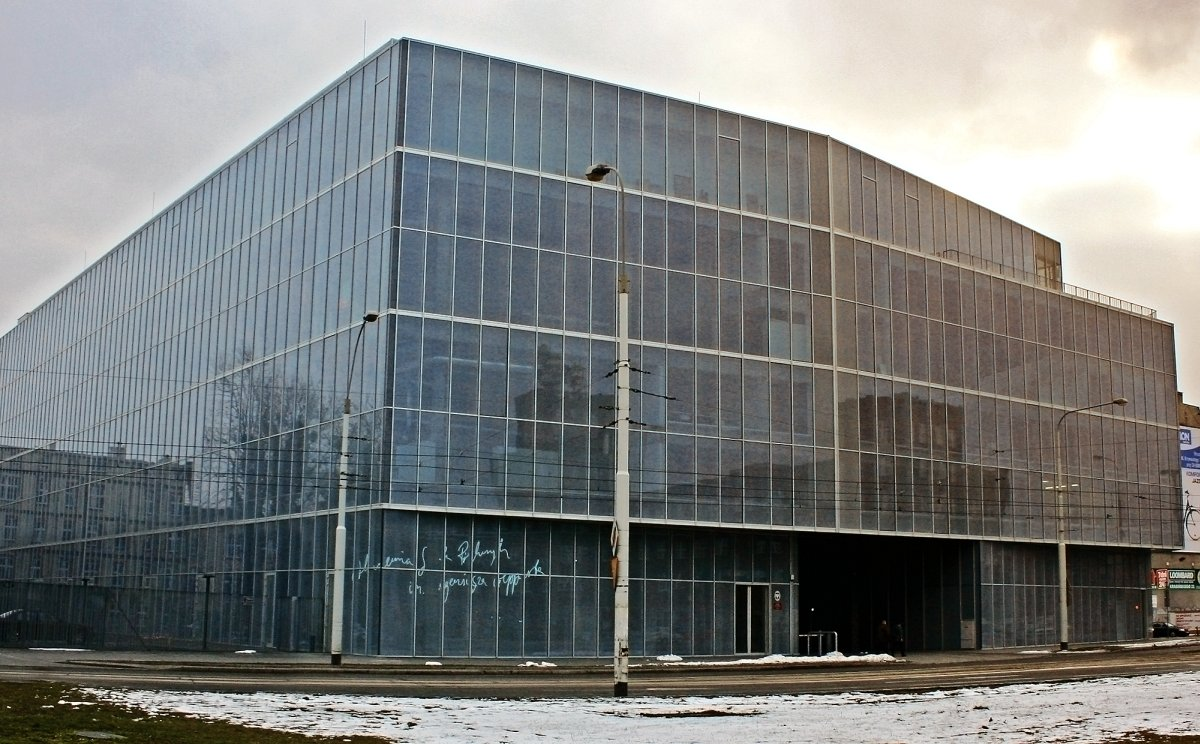 Akademia Sztuk Pięknych im. Eugeniusza Gepperta we Wrocławiu, Centrum Sztuk Użytkowych. Centrum Innowacyjności.